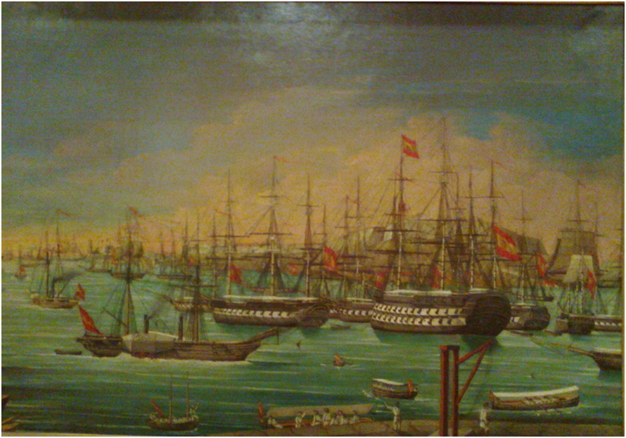 El lienzo representa a la escuadra Española del Apostadero de La Habana alistándose para salir a la mar y hacer frente a la primera incursión de Narciso López.